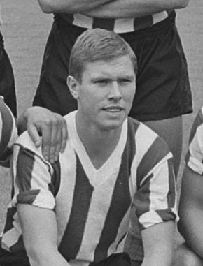 Piet de Vries in 1963.